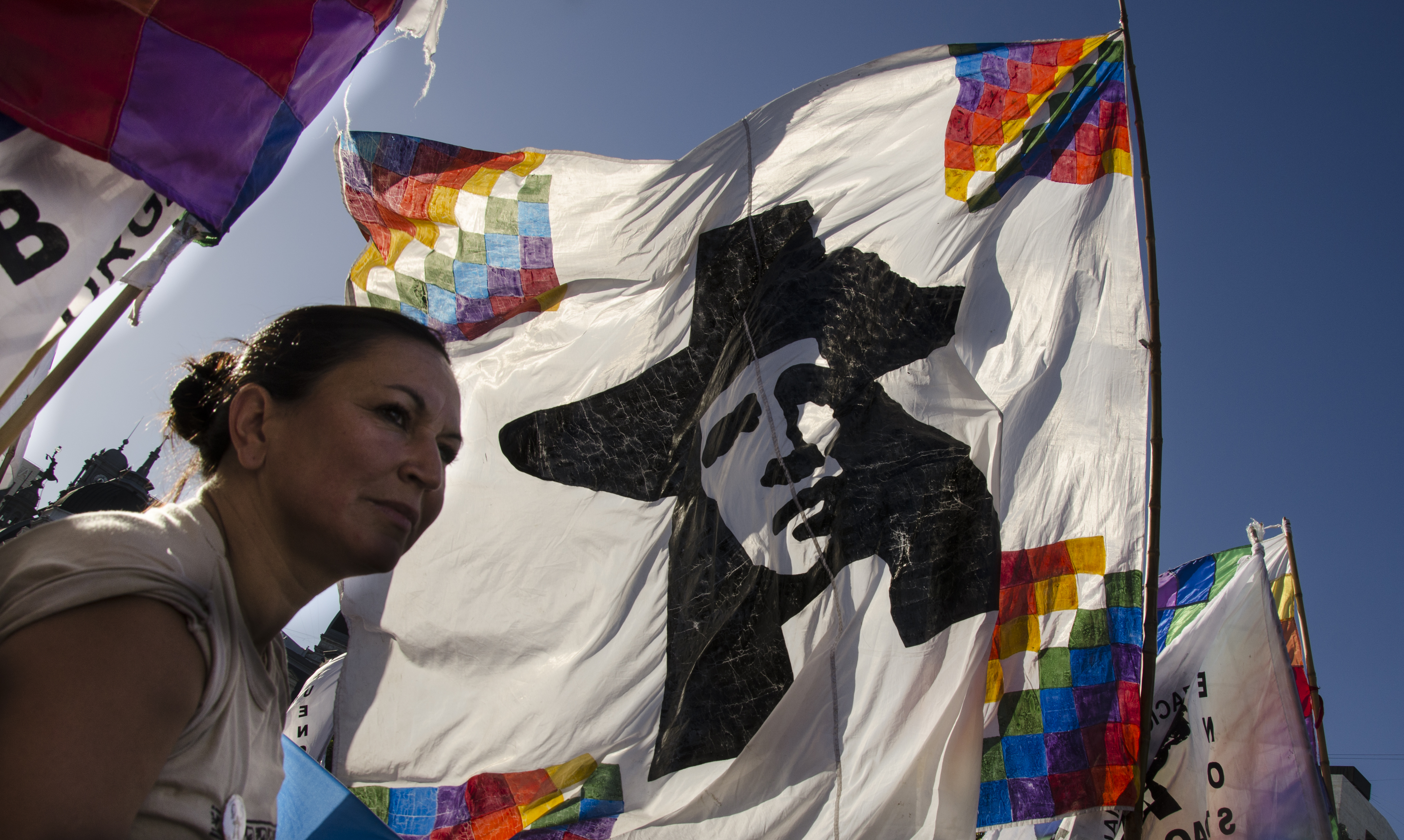 Organización Barrial Túpac Amaru de Jujuy, Argentina